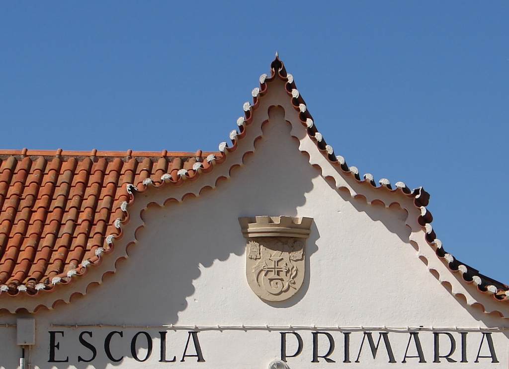 Escola Primária de Sagres Valter Jacinto